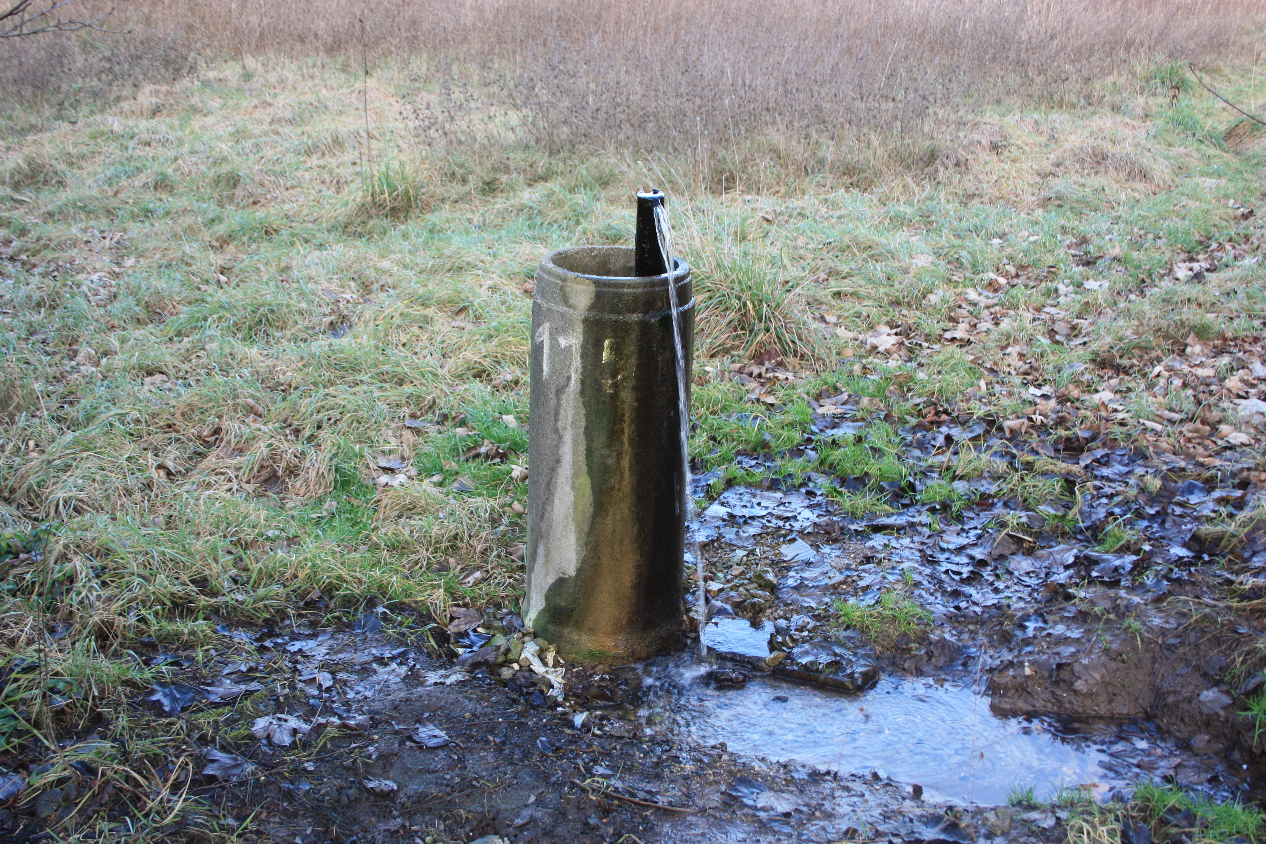 die Quelle der Schlenze als Artesischer Brunnen